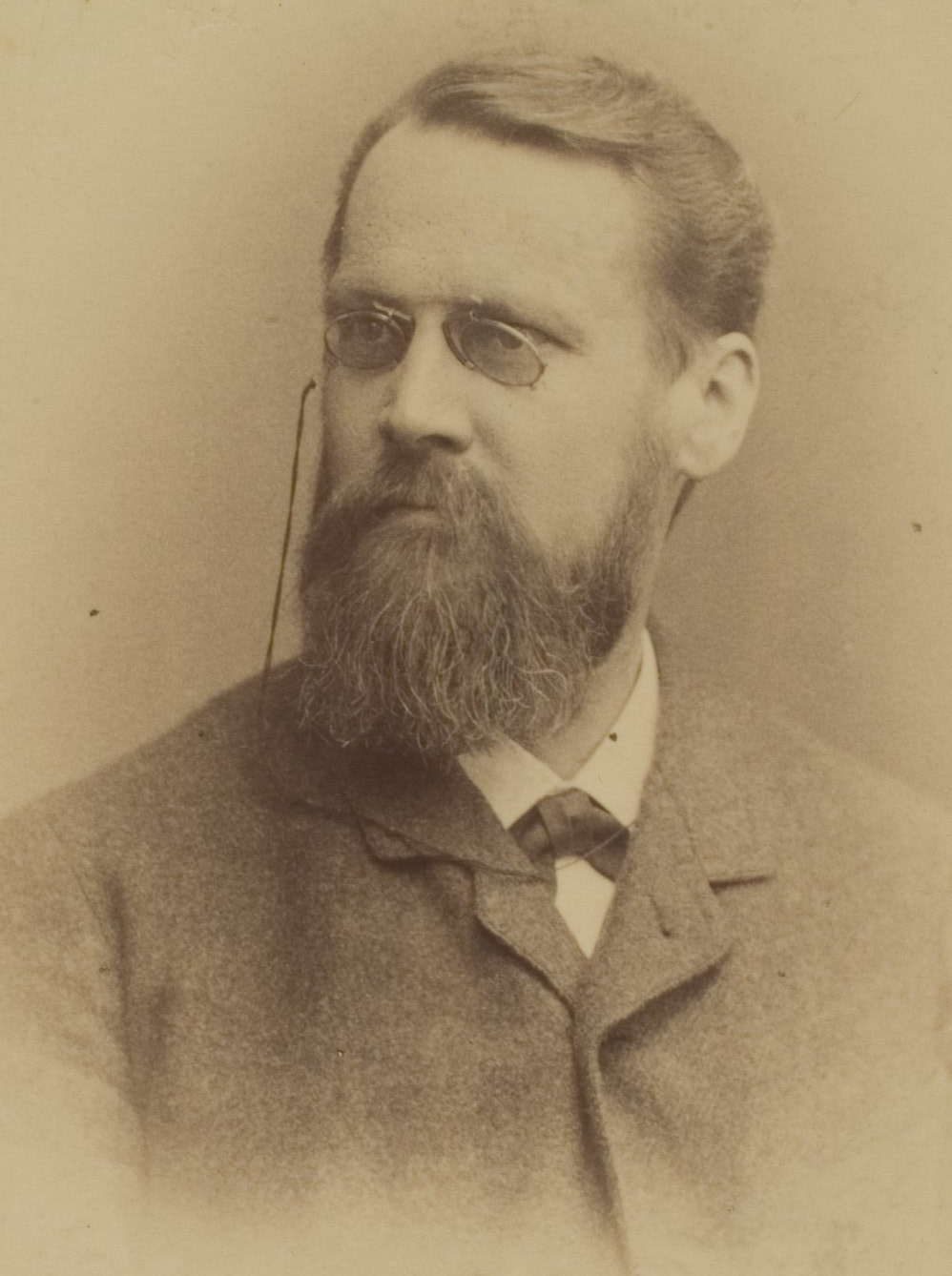 Andreas Heinrich Thorbecke, Orientalist, 1873–1885 und 1889–1890 Professor in Heidelberg